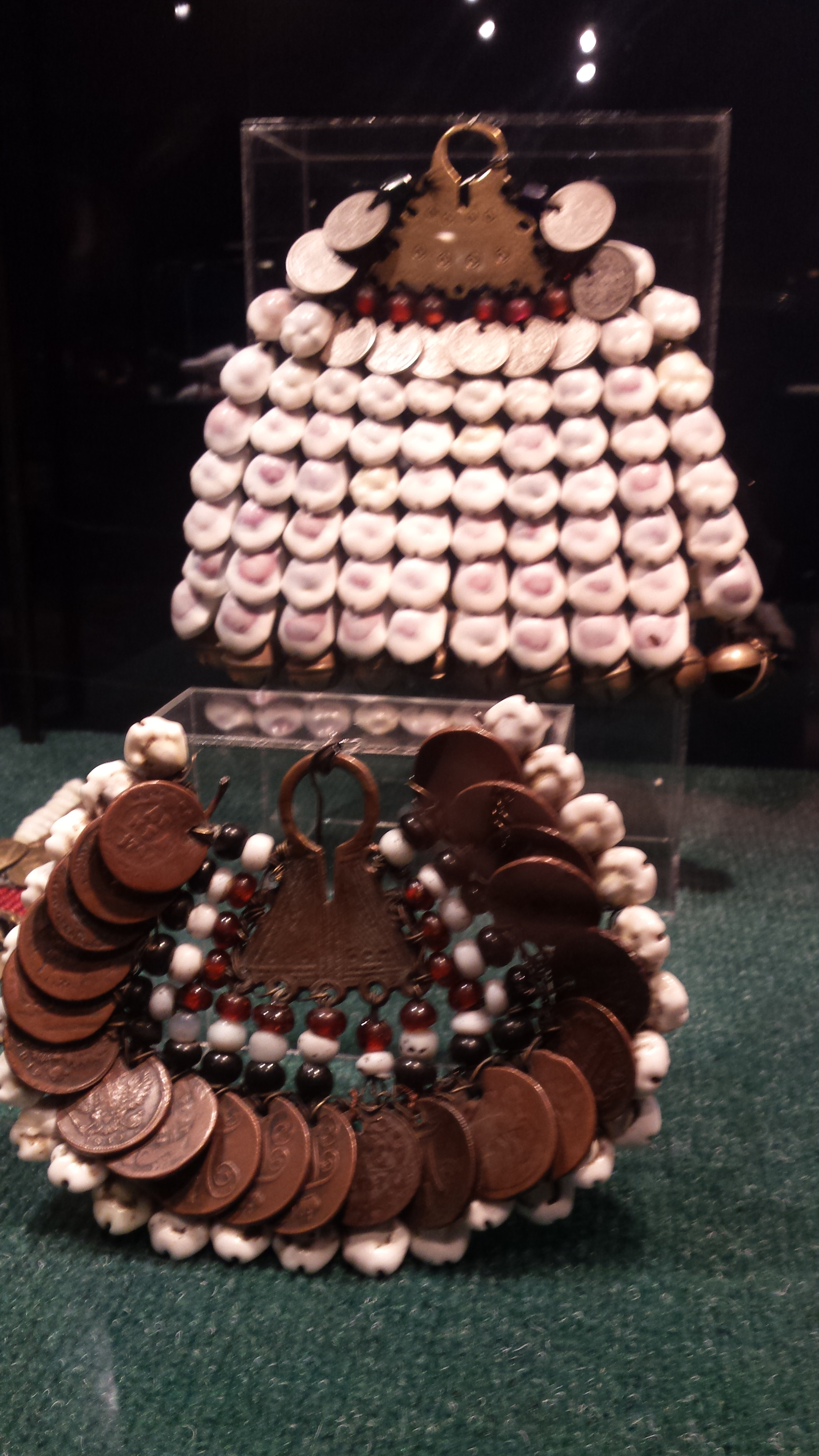 Сюлгам - серебряная женская нагрудная фибула с подвеской, Мордова-мокша, начало XX века. Фибула соединена с подвеской, состоящей из 7 рядов раковин каури, которые закреплены на конструкции из конских волос и ниток, продетых сквозь гусиные перья. Нижний ряд - медные бубенцы. Пензенская губерния, Чембарский уезд. Начало ХХ века (вверху). Сюлгам (внизу) Пензенская губерния, Наровчатовский уезд. конец XIX века. Экспонировалась на выставке "Белое, желтое, красное" в Санкт-Петербурге в январе 2019 года, в Российском этнографическом музее. This photo has been taken in the country: Russia